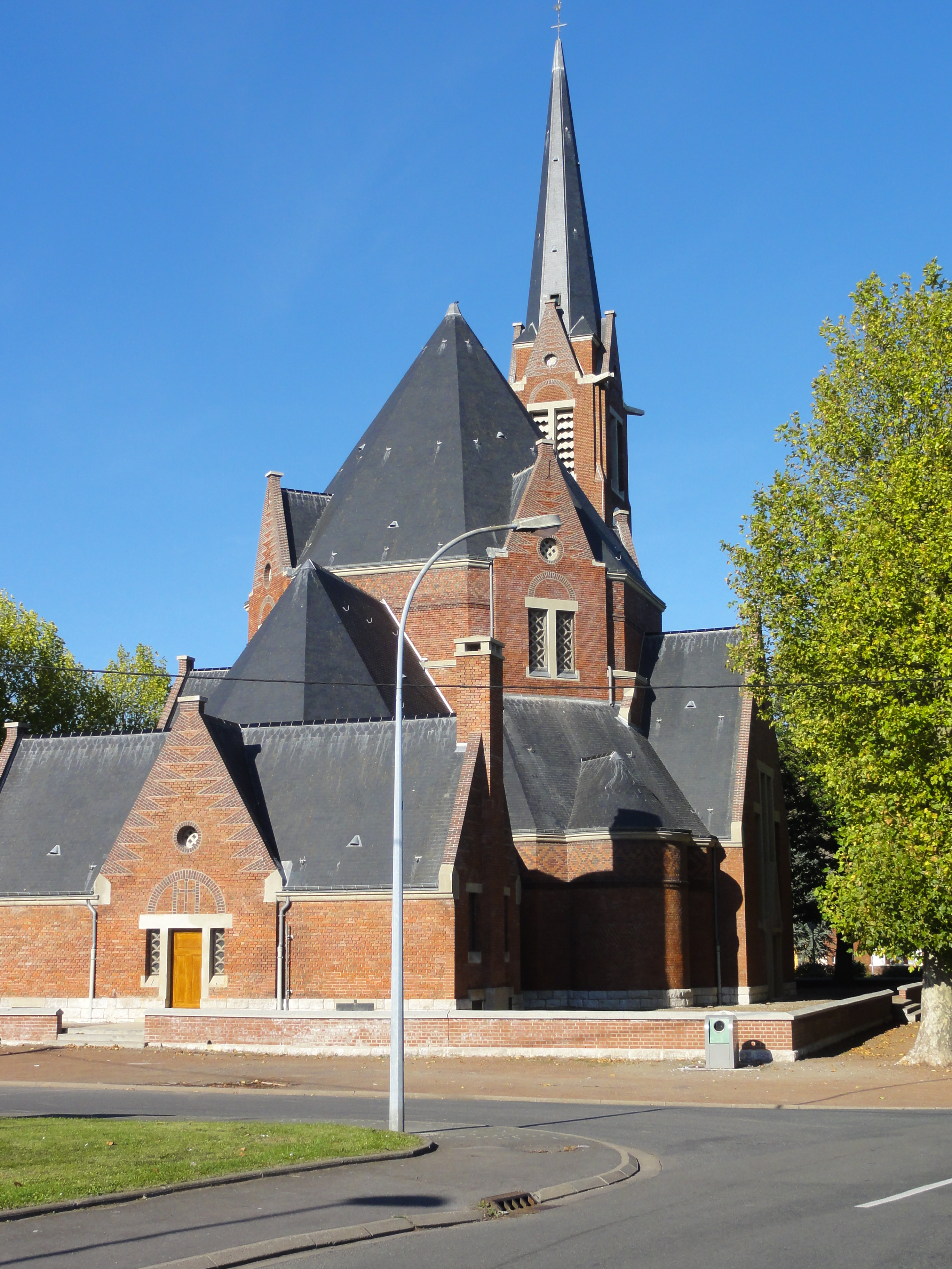 Église Saint-Louis des cités de la Fosse n° 2 de la Compagnie des mines de Drocourt, Rouvroy, Pas-de-Calais, Nord-Pas-de-Calais, France. .